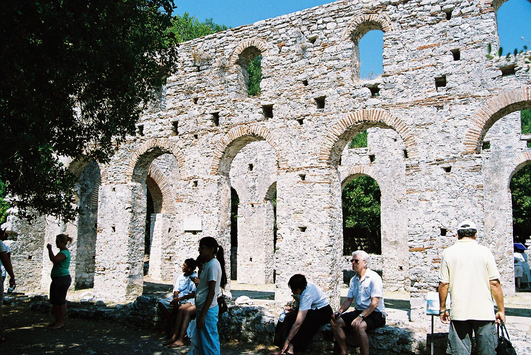 Qyteti Antik Ne Butrint